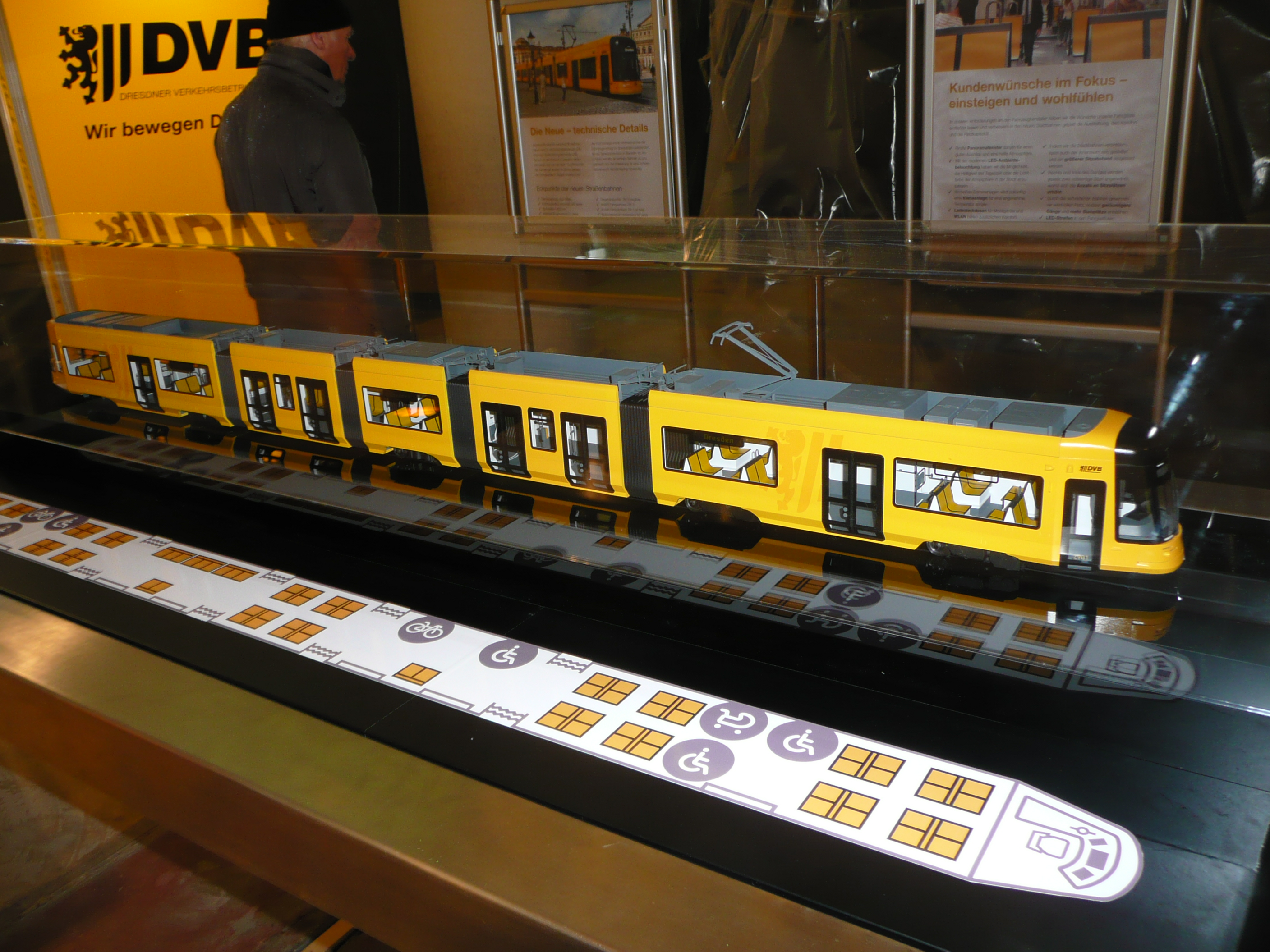 Modellansicht des neuen Dresdner Straßenbahnwagens, fotografiert im Verkehrsmuseum Dresden